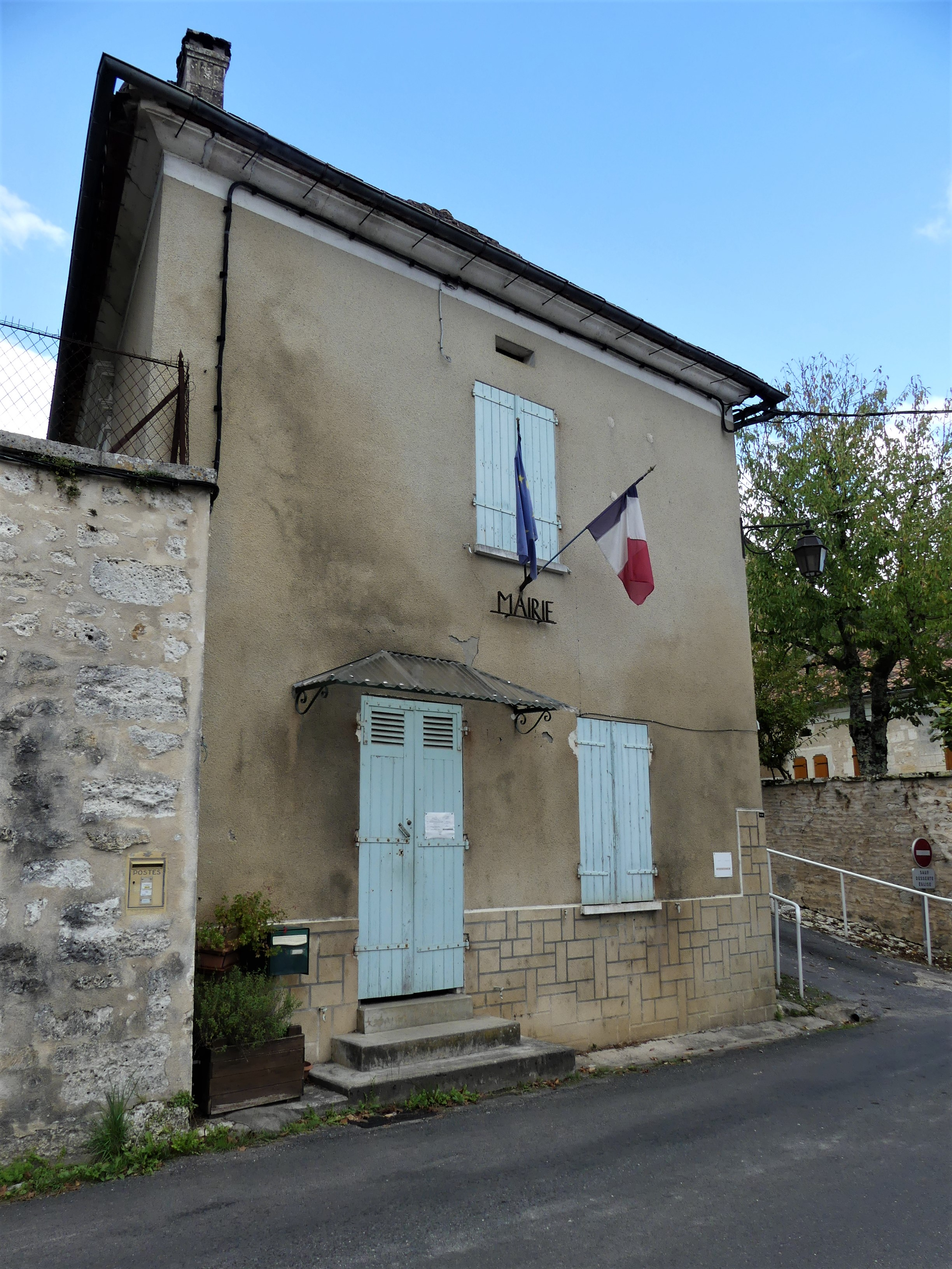 La mairie déléguée de Beaussac, commune nouvelle de Mareuil en Périgord, Dordogne, France.